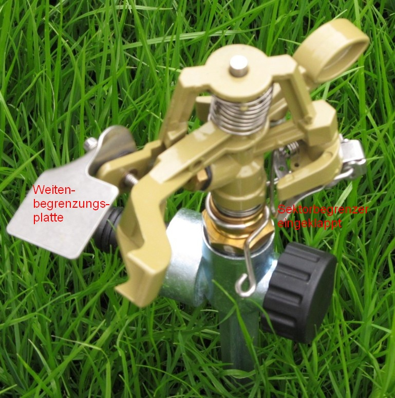 Einfacher Impulsregner mit Beschriftung der Begrenzungselemente